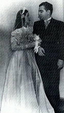 Casamento de Nelson Rodrigues e Elza Bretanha, ocorrido em 17/05/1940.